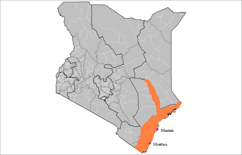 Територія_розселення_міджікенда.PNG: ткриторія розселення народів міджікенда на мапі Кенії